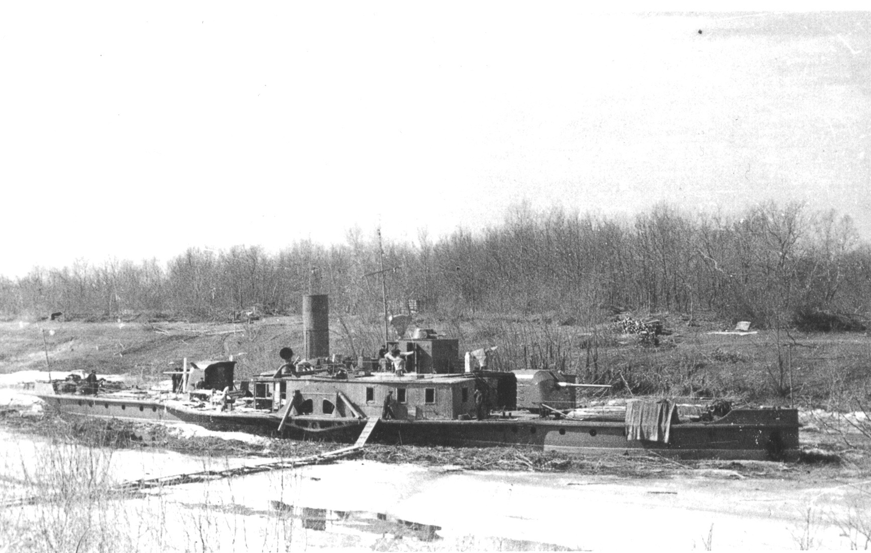 Канонерская лодка "Усыскин", прославившаяся во время Сталинградской битвы и награждённая орденом Красного Знамени. Фотография сделана зимой 1942-43 года на реке Ахтуба в районе села Безродное, где канонерка базировалась во время битвы за Сталинград. Фотография сделана после окончания битвы 2 февраля 1943 года.